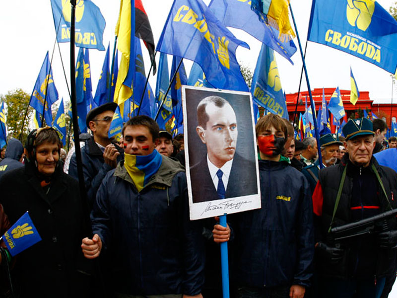 Марш УПА, Київ, 2009-10-14.